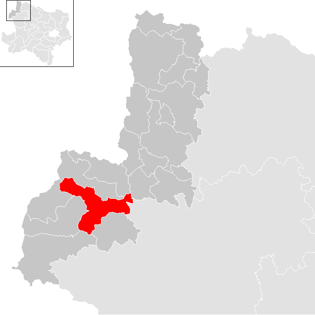 Bezirk Gmünd